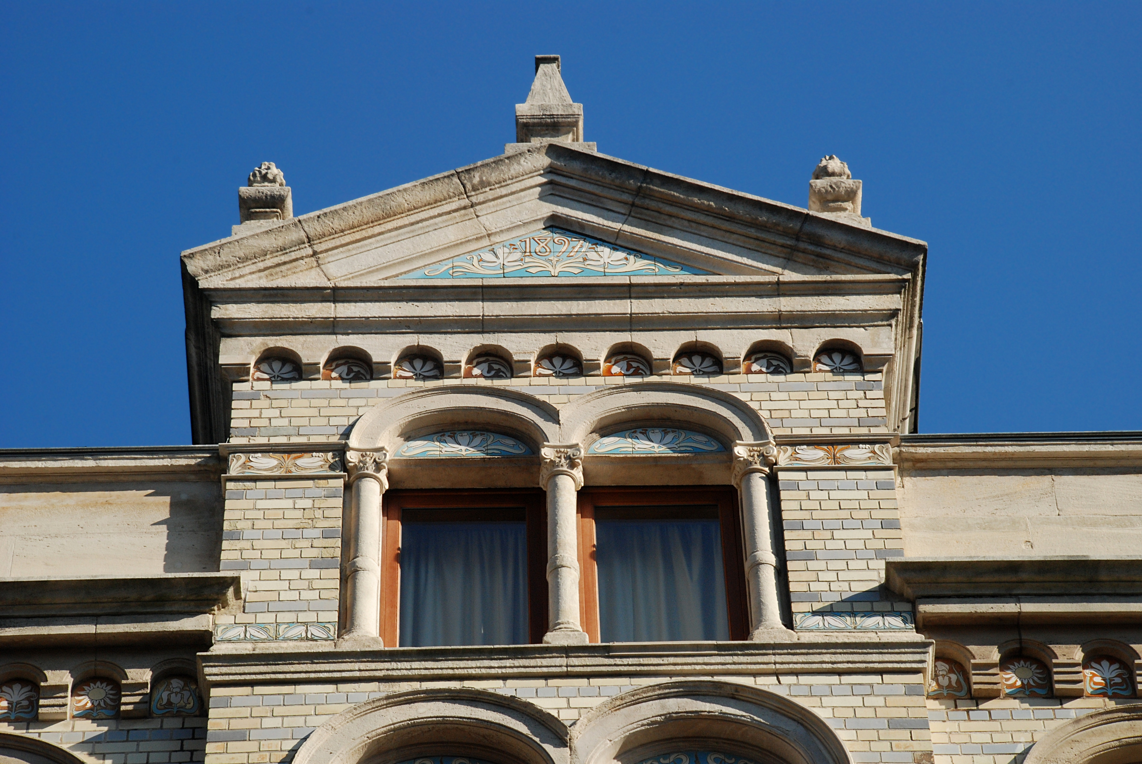 Grande Maison de Blanc, rue du Marché aux Poulets, 32-34 à Bruxelles (Belgique), céramiques de Privat Livemont